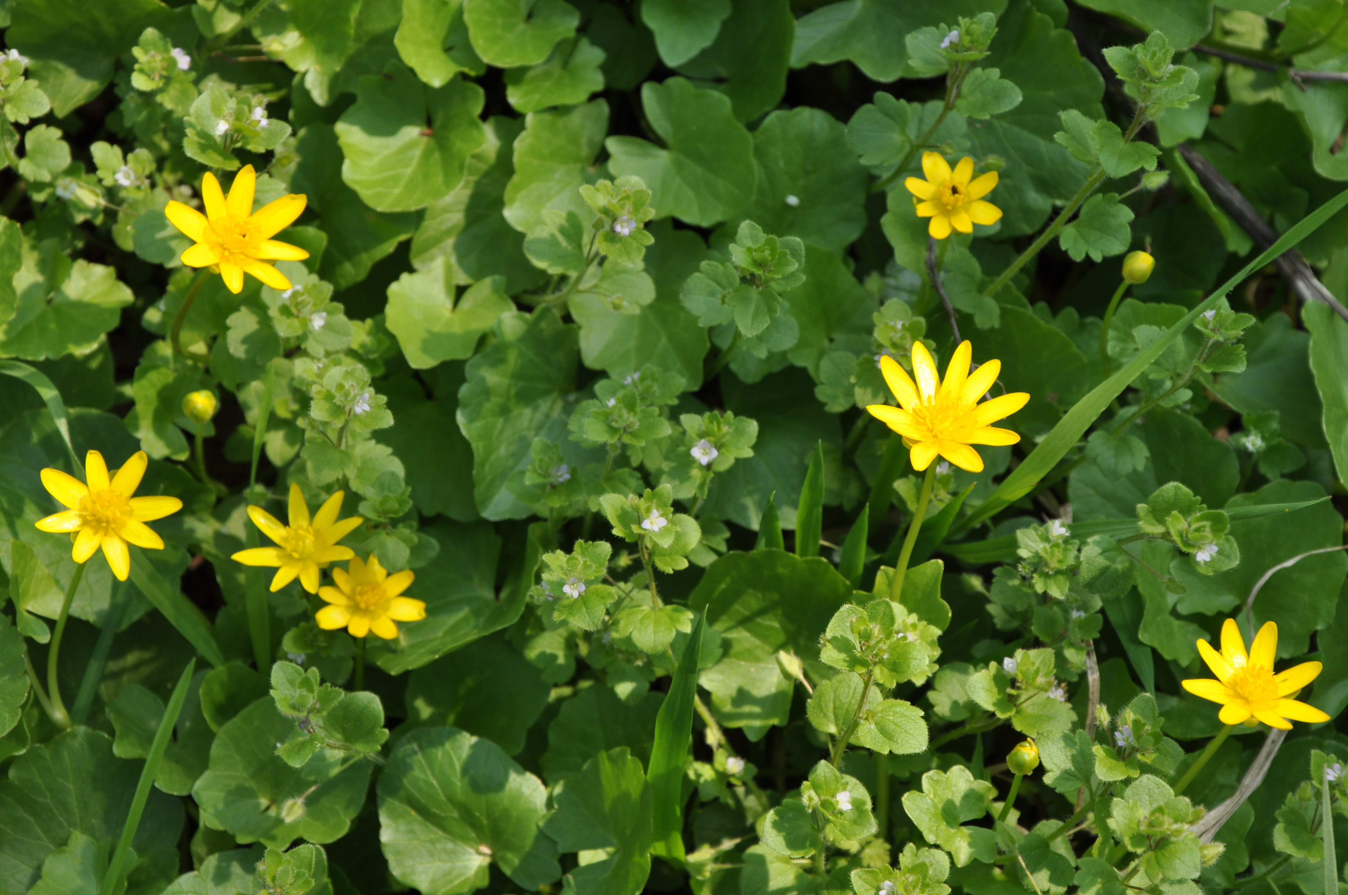 Orsej jarní (Ficaria verna) v PP Nosislavská zátočina.